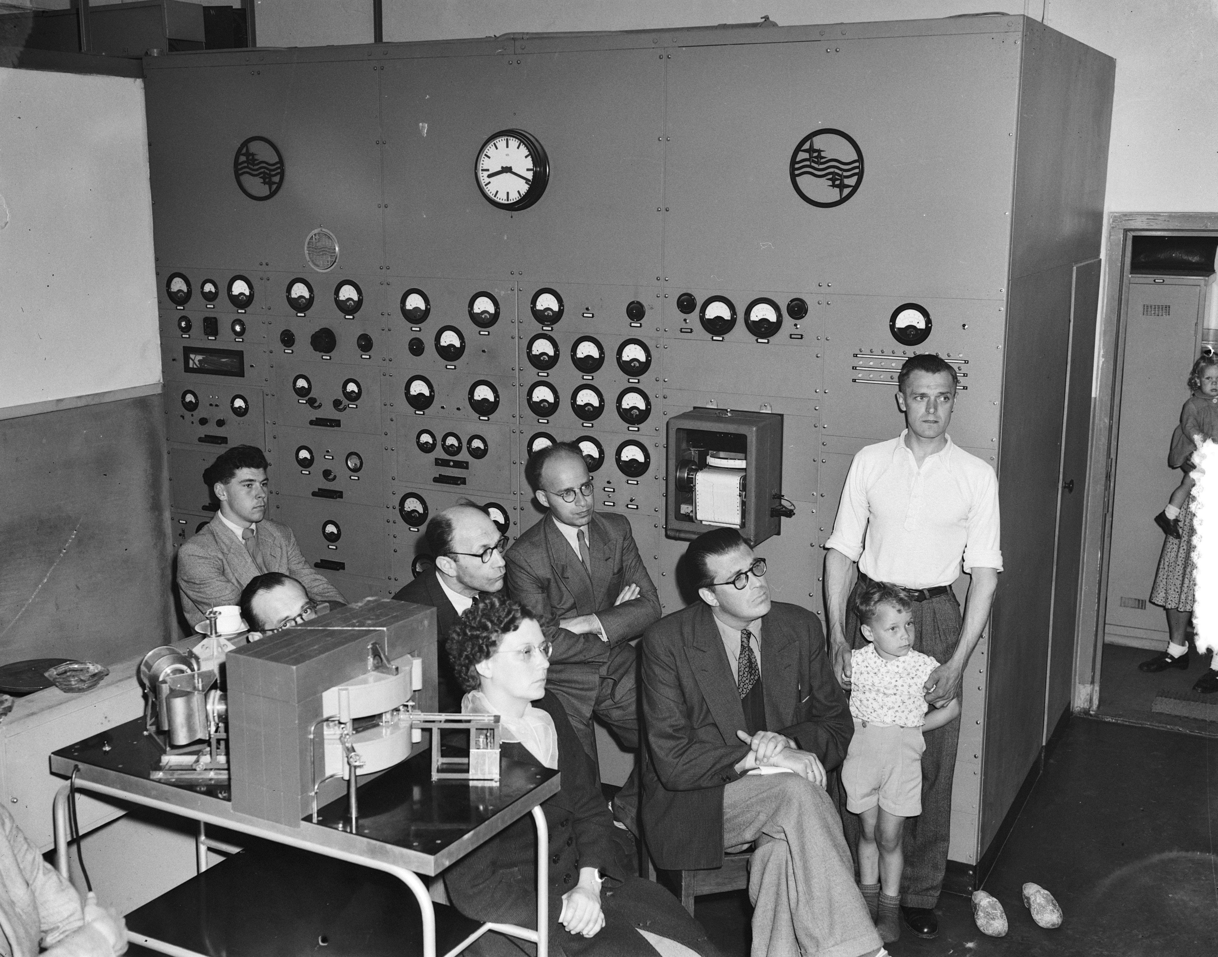 Collectie / Archief : Fotocollectie Anefo Reportage / Serie : [ onbekend ] Beschrijving : Opdracht voor Parool Cyclation Middenweg Datum : 27 juni 1952 Trefwoorden : opdrachten Fotograaf : Consenheim, Wim / Anefo Auteursrechthebbende : Nationaal Archief Materiaalsoort : Negatief (zwart/wit) Nummer archiefinventaris : bekijk toegang 2.24.01.04 Bestanddeelnummer : 905-1876